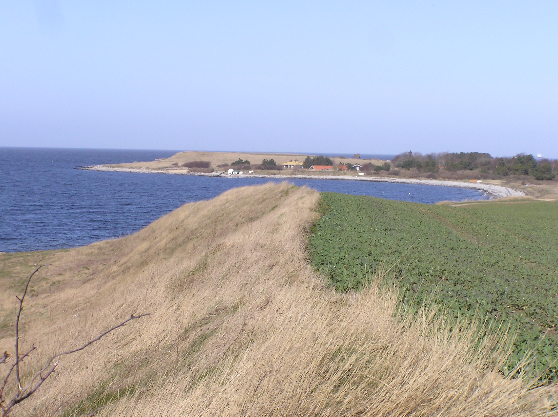 Danmark Sjælland Seierø